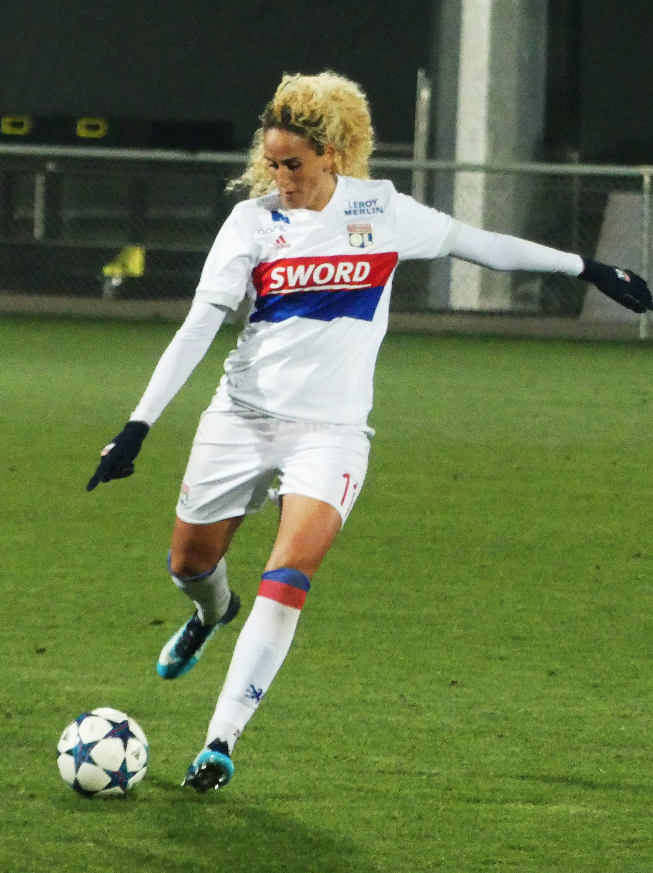 Kheira Hamraoui lors du match contre BIIK Kazygurt en Ligue des Champions le 15 novembre 2017.